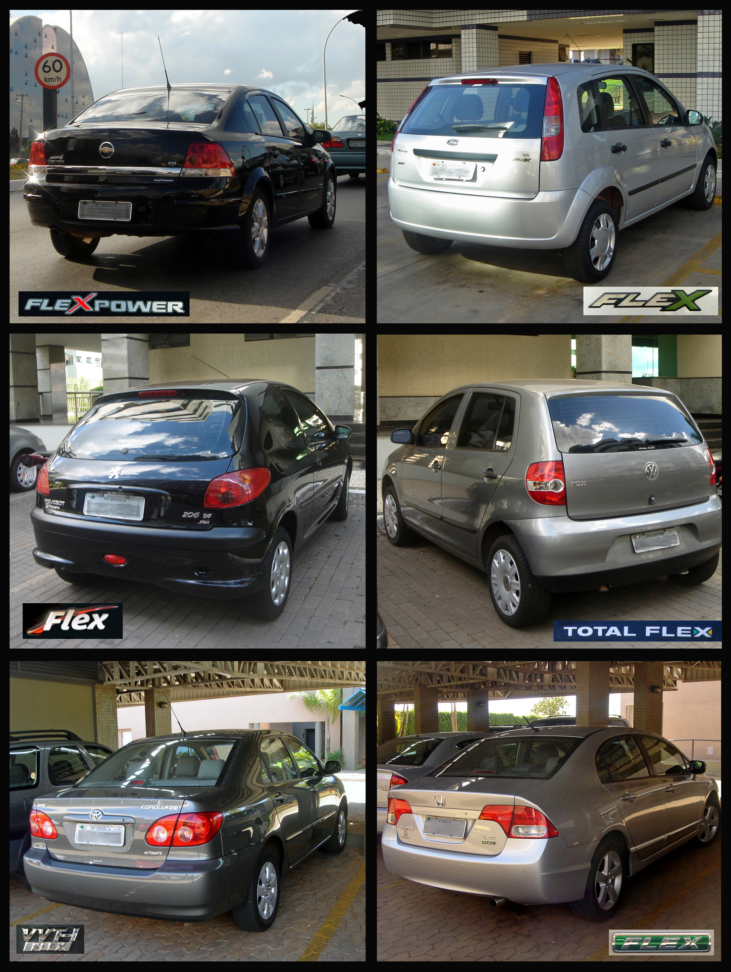 Typical Brazilian made dual-fuel (ethanol and gasoline) or full flex-fuel automobile models.